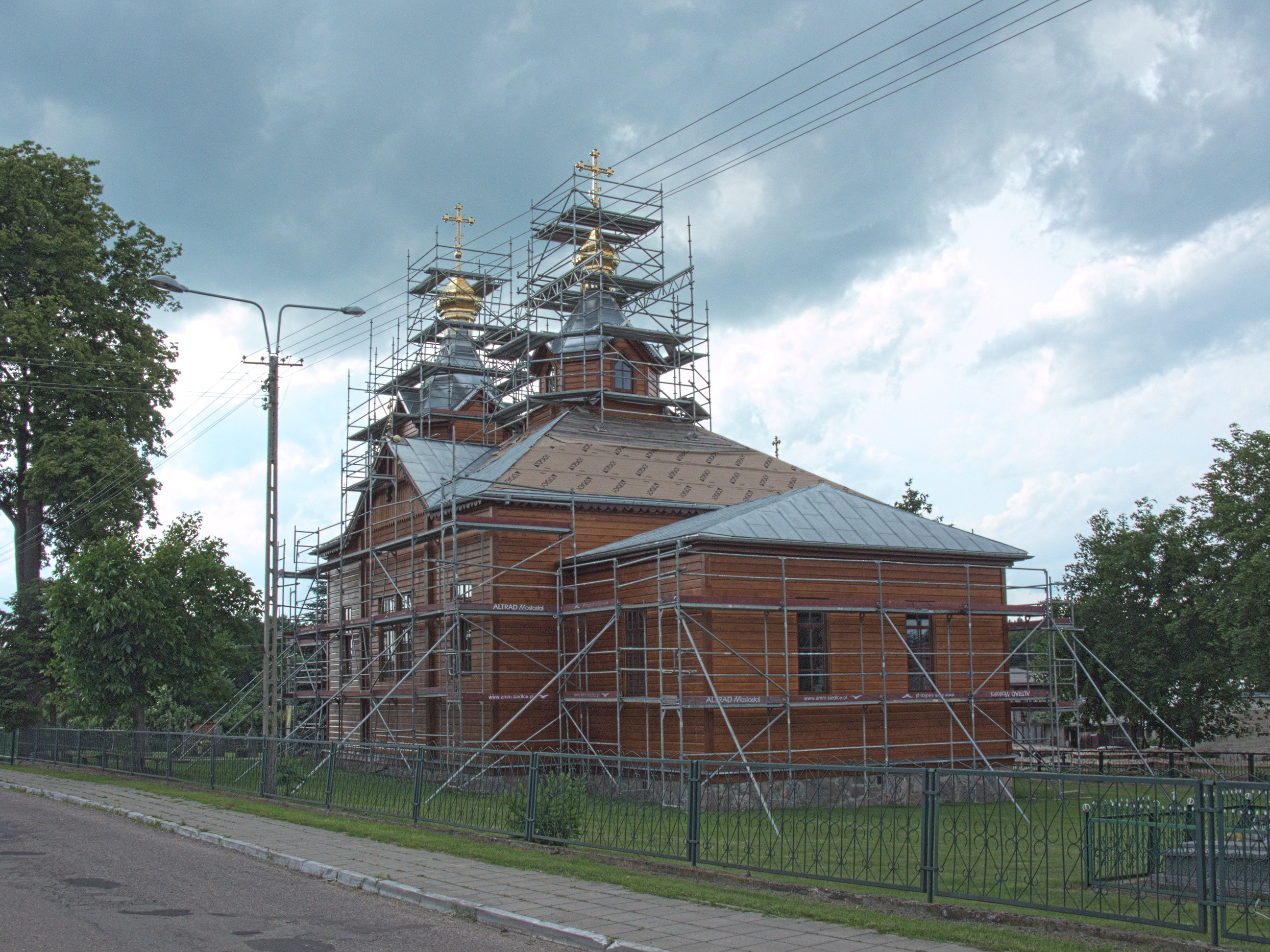 Cerkiew pod wezwaniem św. Barbary w Milejczycach w trakcie remontu.